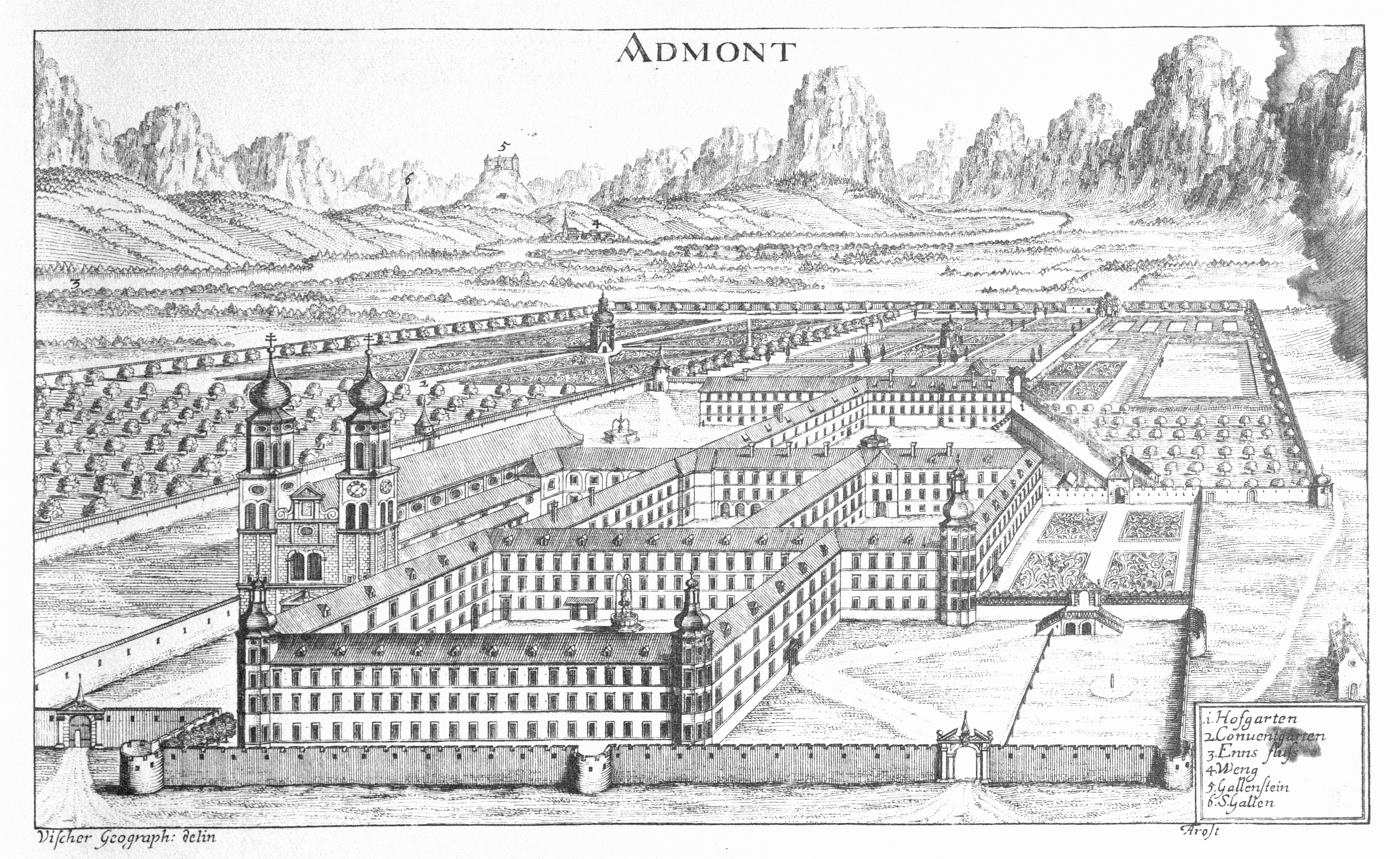 G. M. Vischers Käyserlichen Geographi, Topographia Ducatus Stiriae, Das ist: Eigentliche Delineation / und Abbildung aller Städte / Schlösser / Marcktfleck / Lustgärten / Probsteyen / Stiffter / Clöster und Kirchen / so es sich im Herzogthumb Steyrmarck befinden; Und anjetzo Umb einen billichen Preyß zu finden seynd Bey Johann Bitsch Universitäts Buchhandlern / Auff dem Juden=Platz bey der guldenen Saulen. Graz 1681